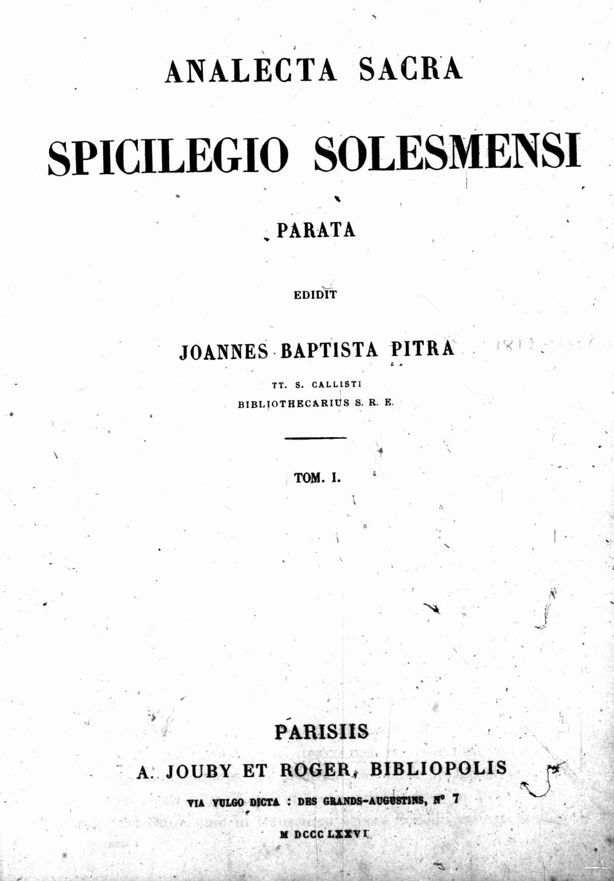 Frontespizio